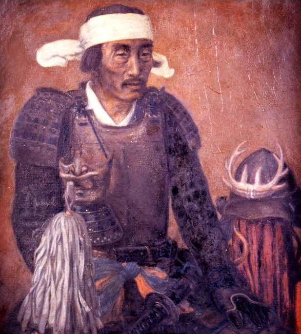 仙台真田氏9代当主・真田幸歓の肖像画。